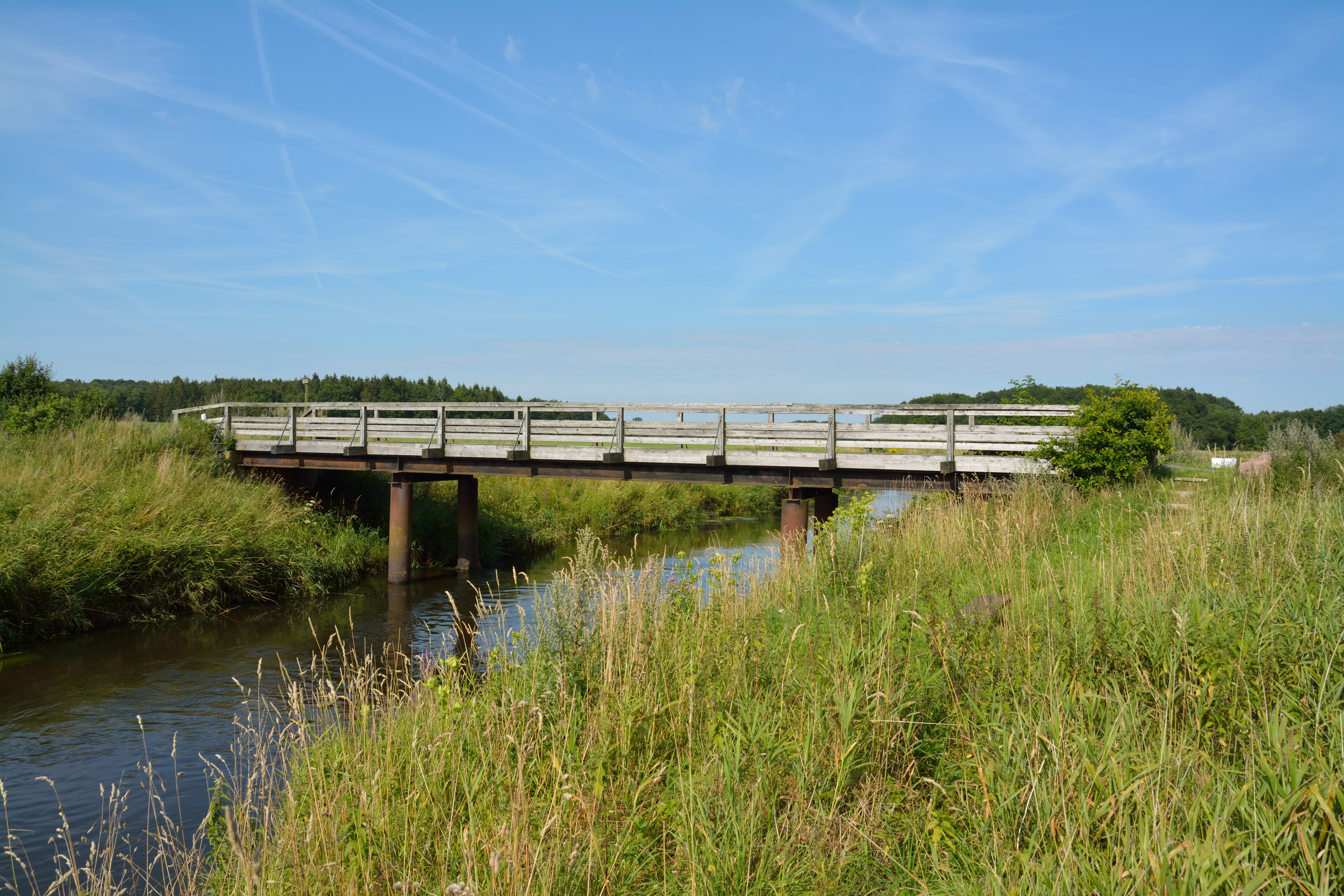 Die Pionierbrücke über die Stör verbindet die Orte Brokstedt und Fitzbek